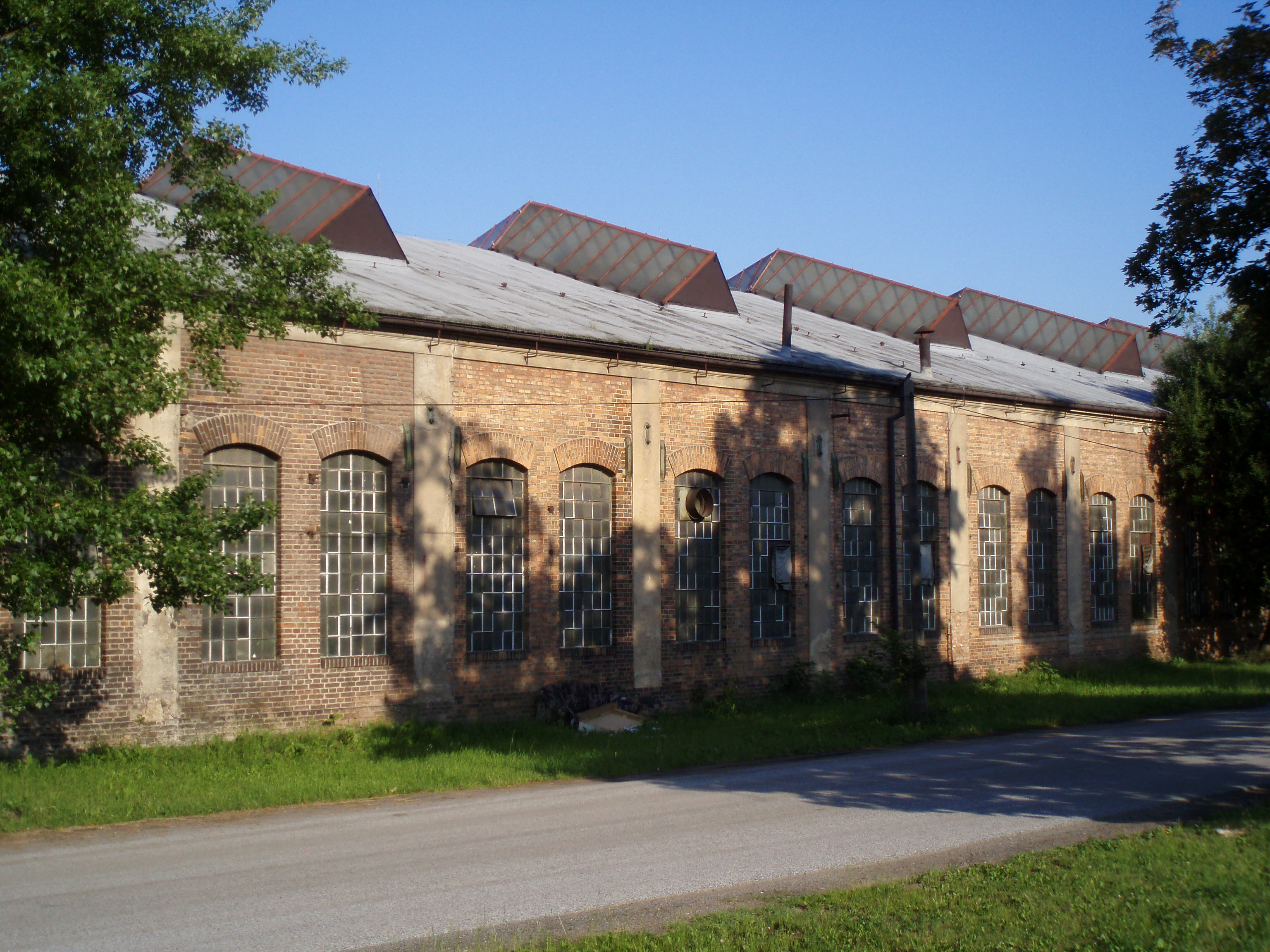 Bývalá Ippenova mostárna v Hradci Králové